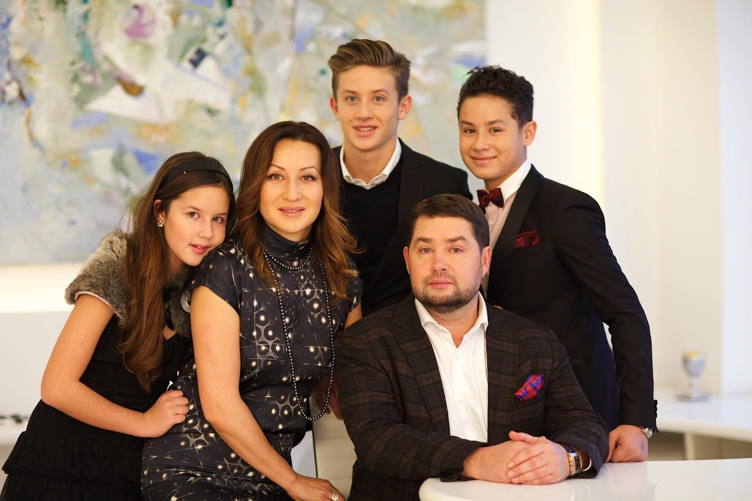 Игорь Никитин с семьей